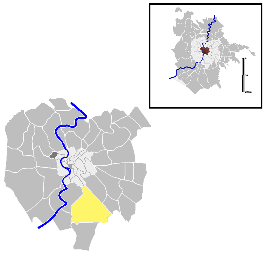 Ardeatino